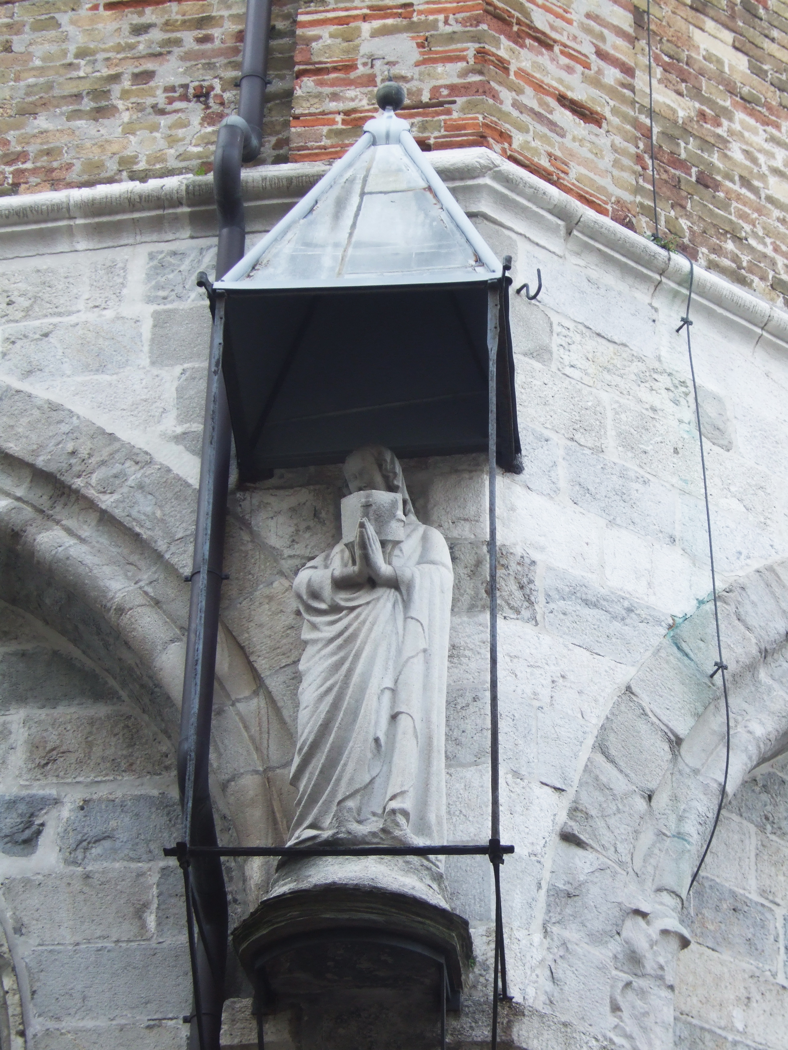 Duomo di Udine - Madonna Annunciata - seconda metà XIV secolo